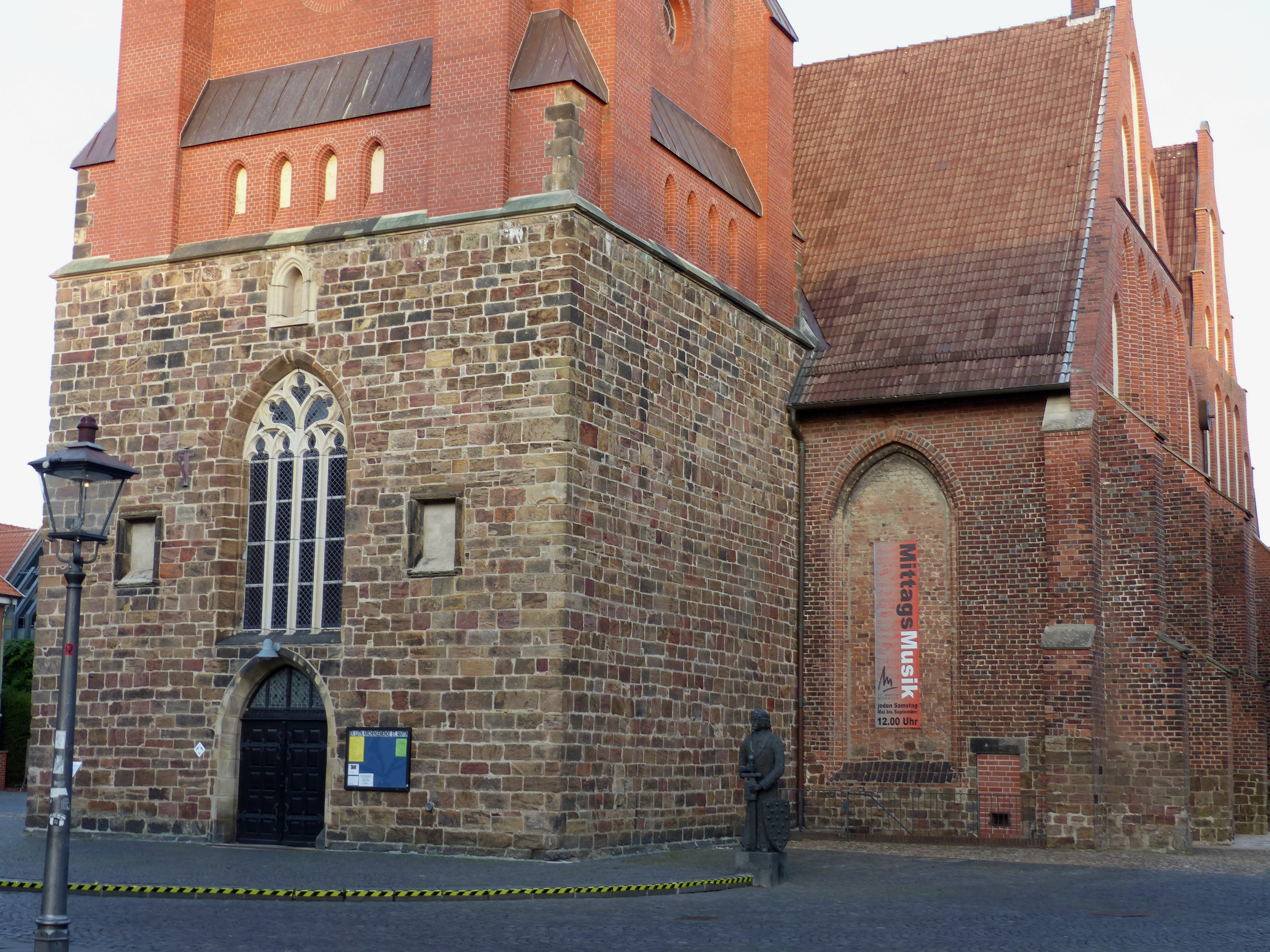 Martinskirche in Nienburg an der Weser, Turmbasis und Teile des Chors aus Portasandstein, Schiff (1441 geweiht) aus Backstein, Maßwerkfenster über dem Portal mittelalterlich, obere Turmgeschosse neugotisch, Maßwerk der Schiffsfenster und große Teile der südlichen Giebel ersetzt